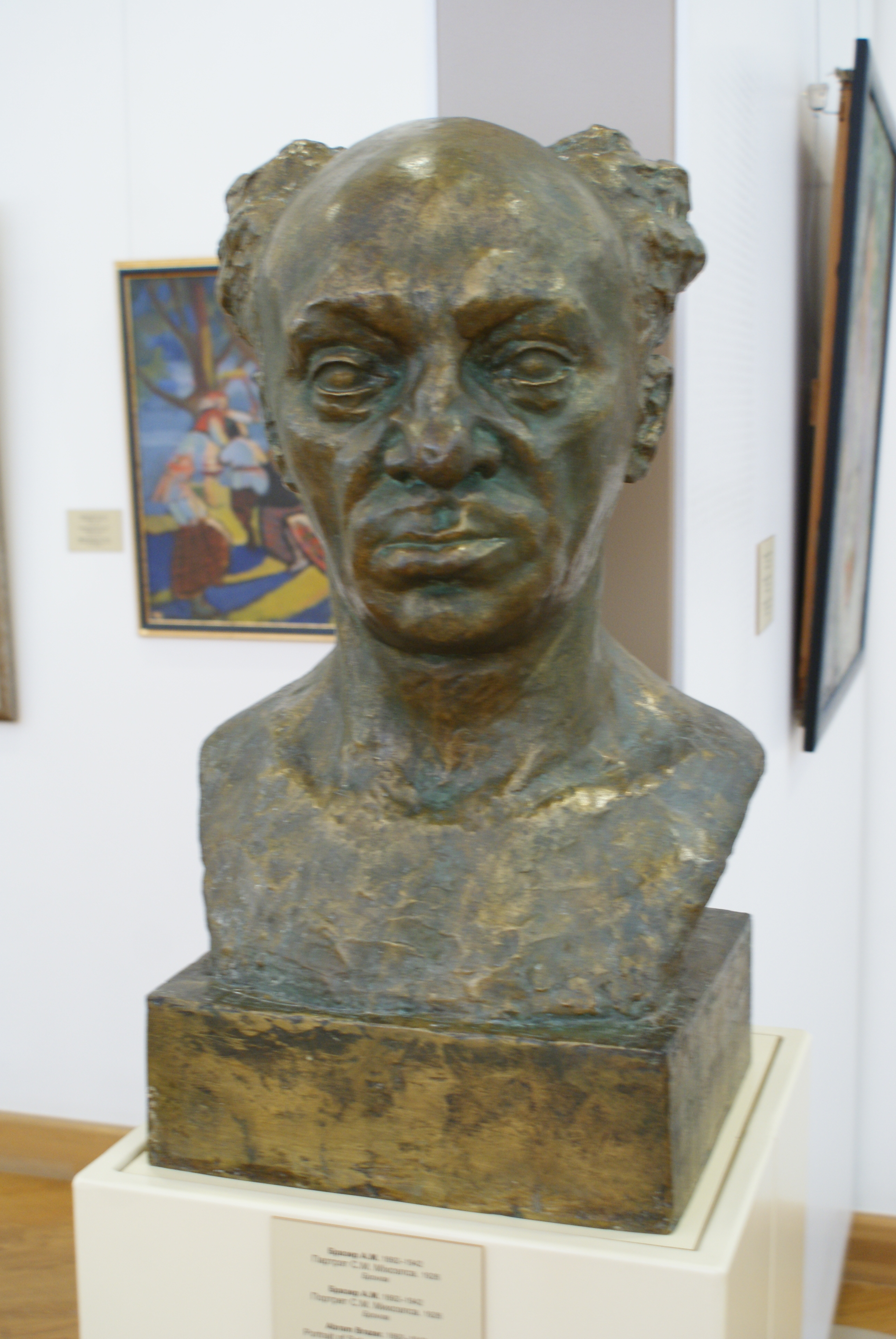 Партрэт С. М. Міхоэлса. Бронза